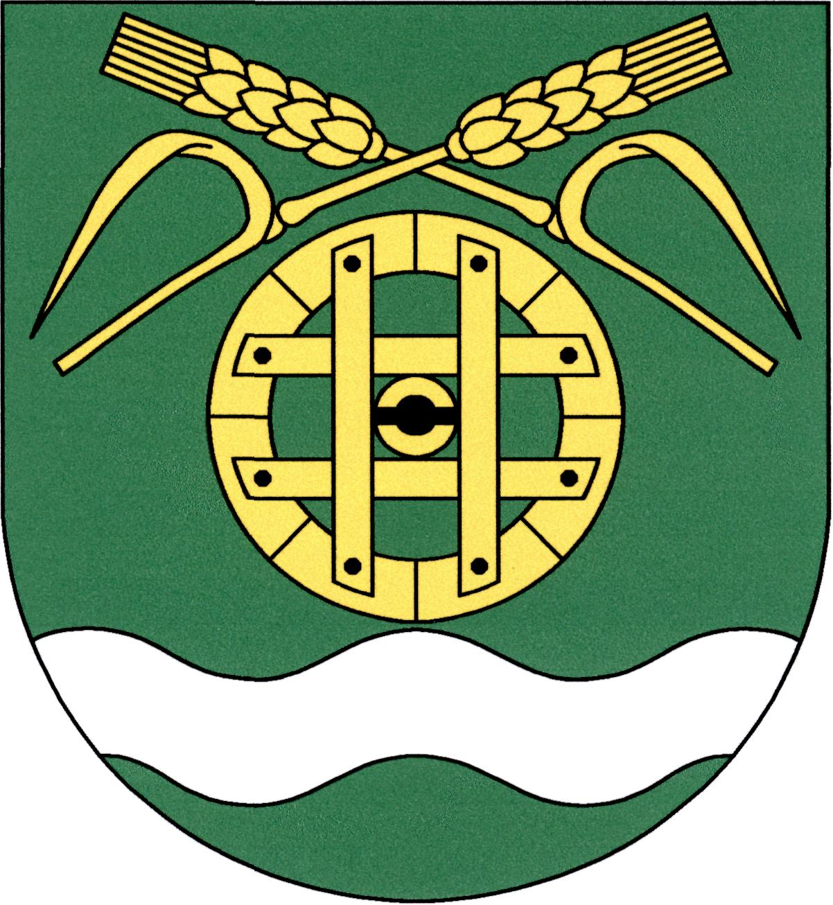 Znak obce Velký Borek